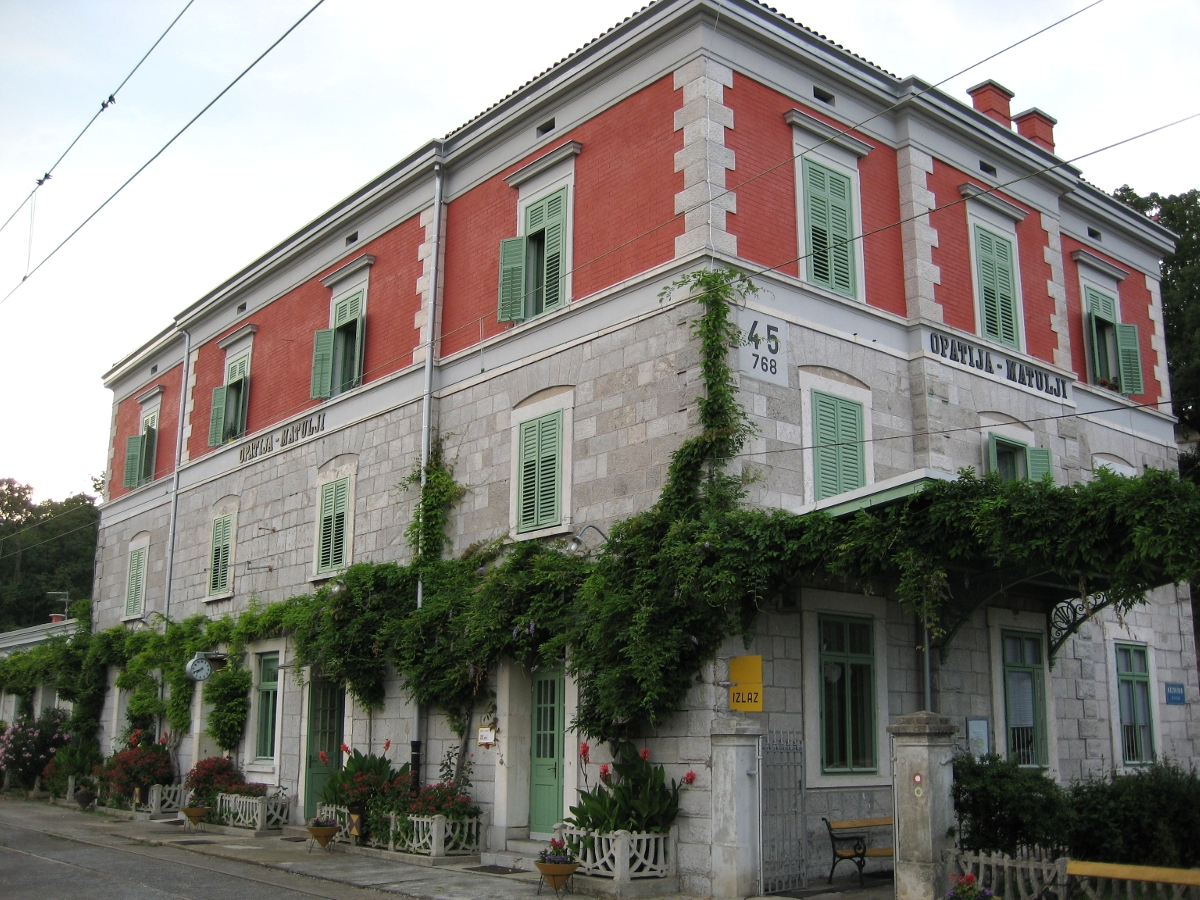 Željeznička postaja Opatija - Matulji